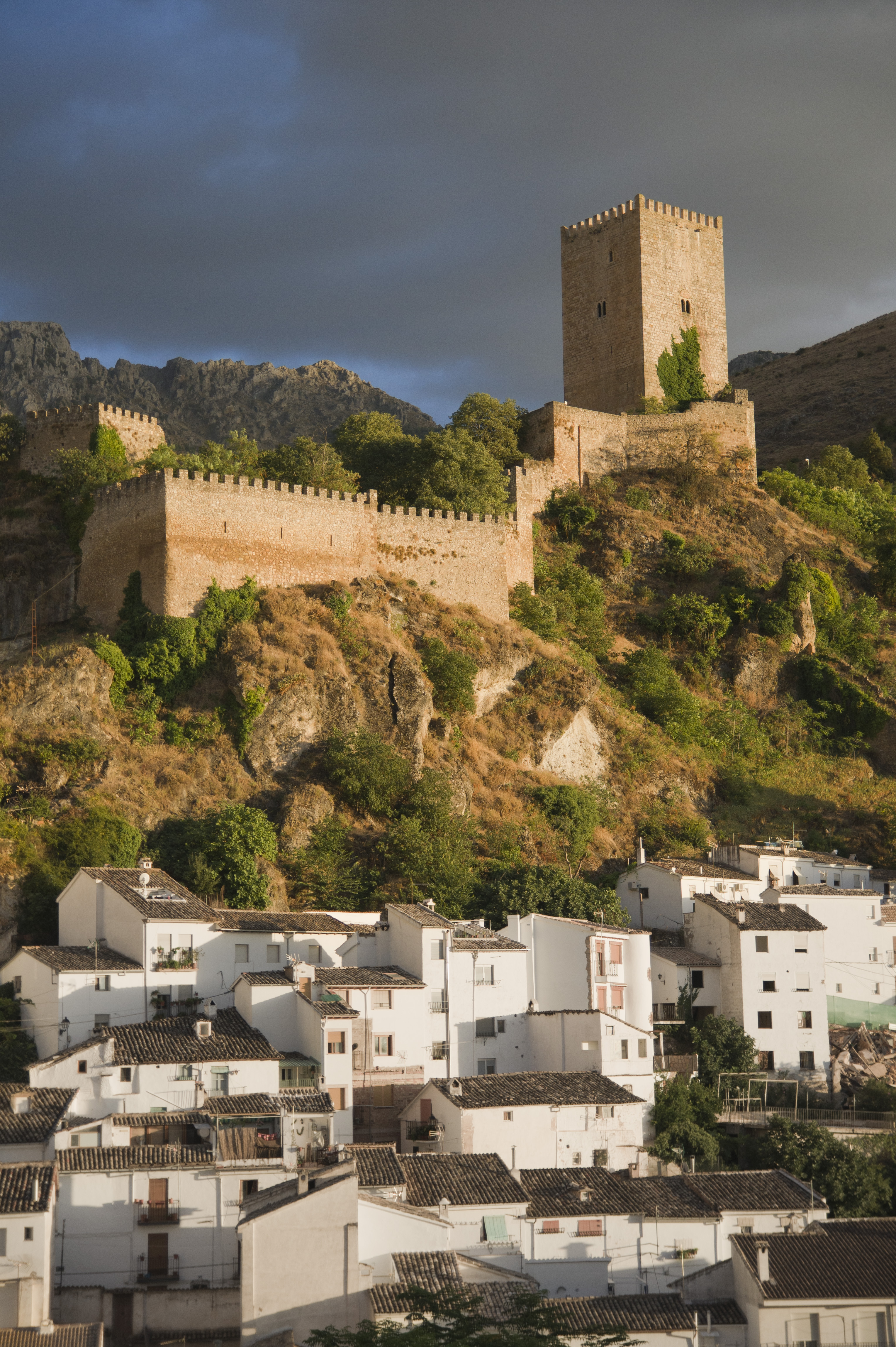 Castillo de la Yedra (Castillo de las Cuatro Esquinas)